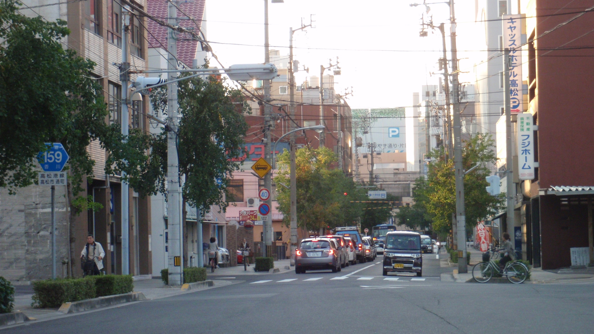 香川県道159号高松港線。高松市通町から西方向（裁判所方面）を見る。